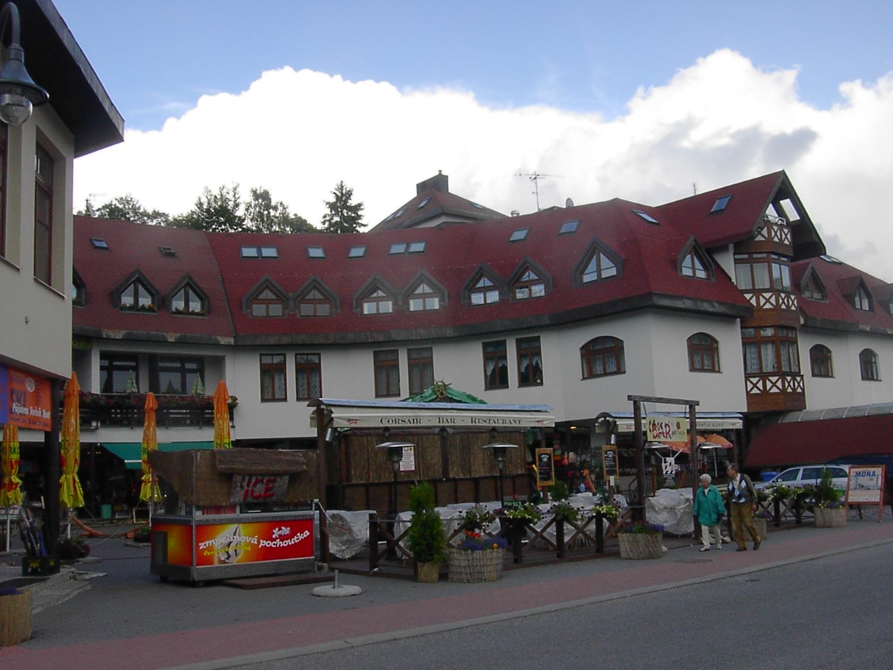 Nová výstavba v centru Harrachova.